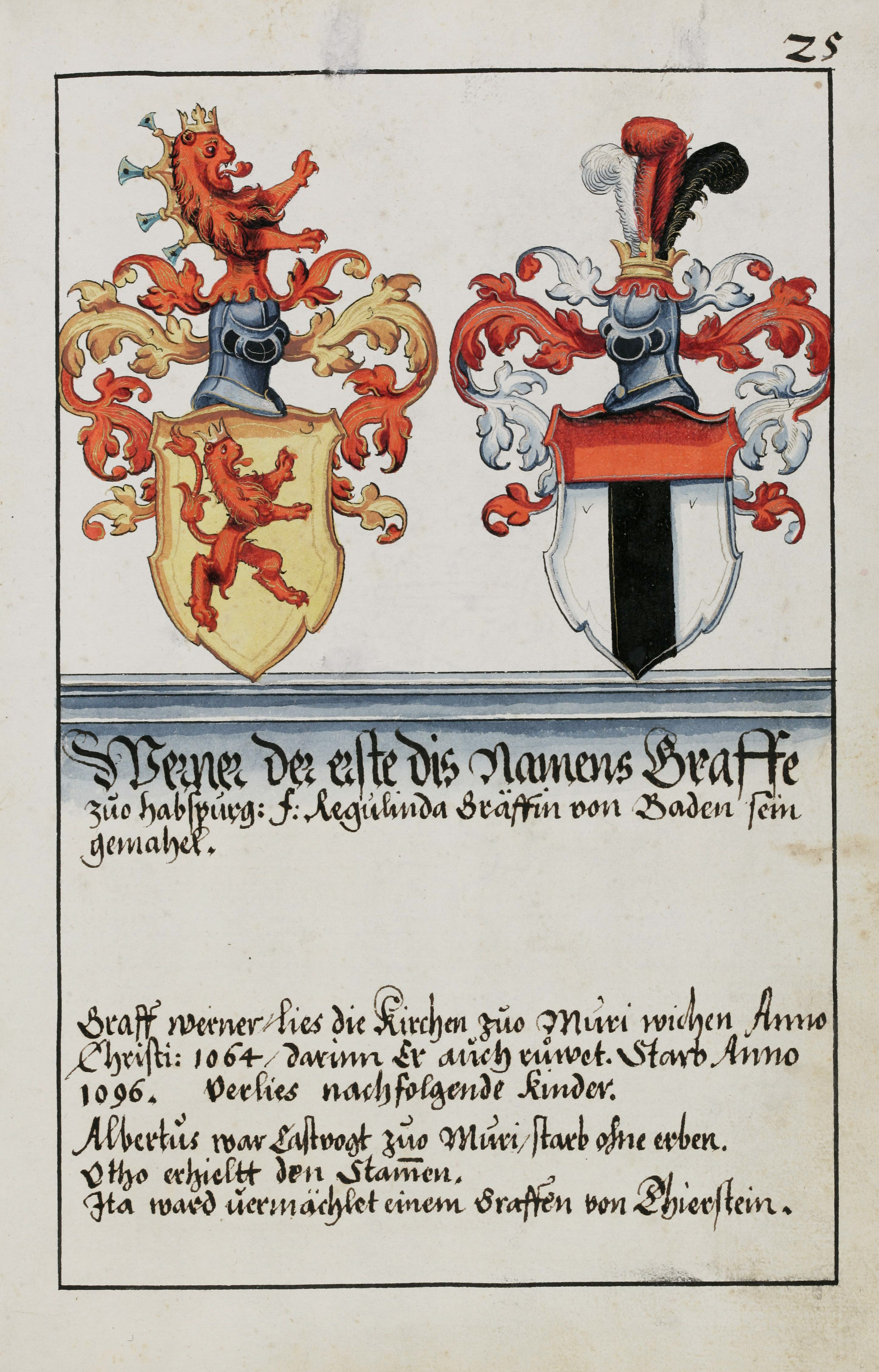 Wappenbuch des Hans Ulrich Fisch. Papier, 31.5 x 19.5 cm, Aarau 1627. Aarau, Staatsarchiv Aargau, V/4-1985/0001, fol. 25r